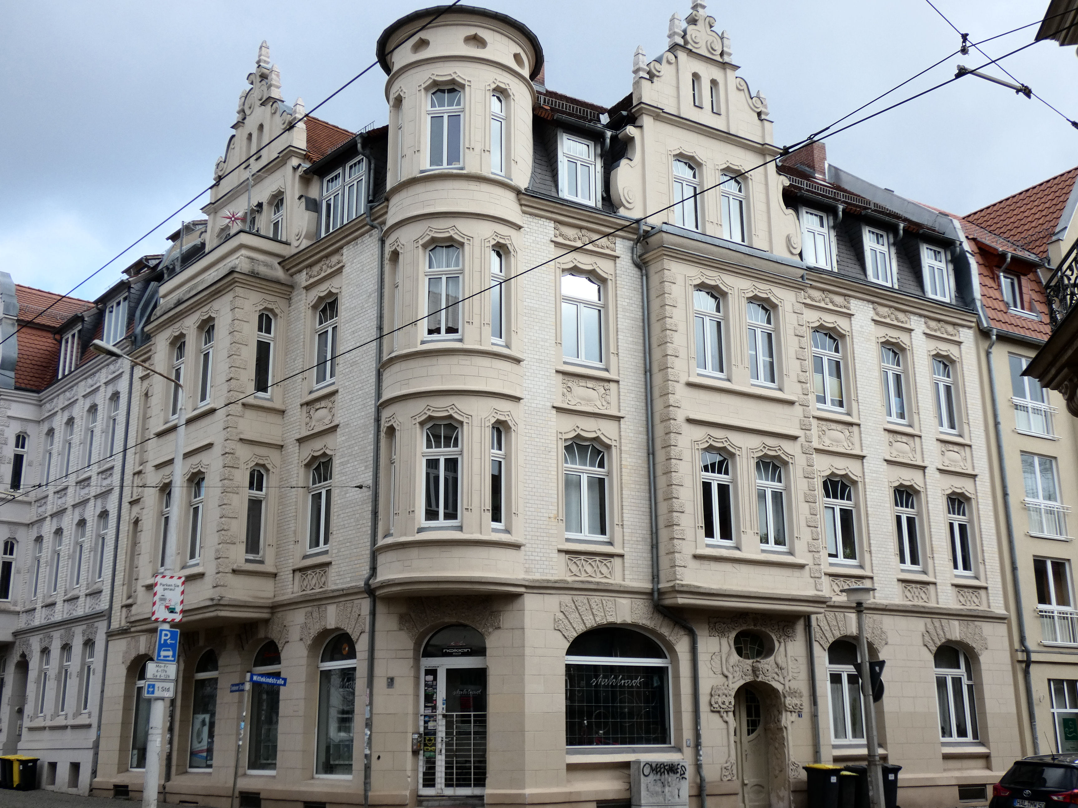 Wittekindstraße 1, Ecke Beesener Straße, Halle (Saale)